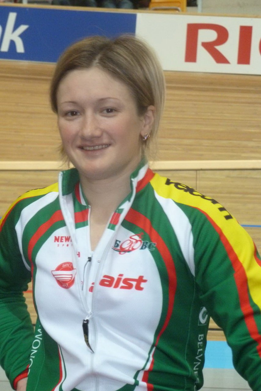 Olga Panarina, weißrussische Radrennfahrerin